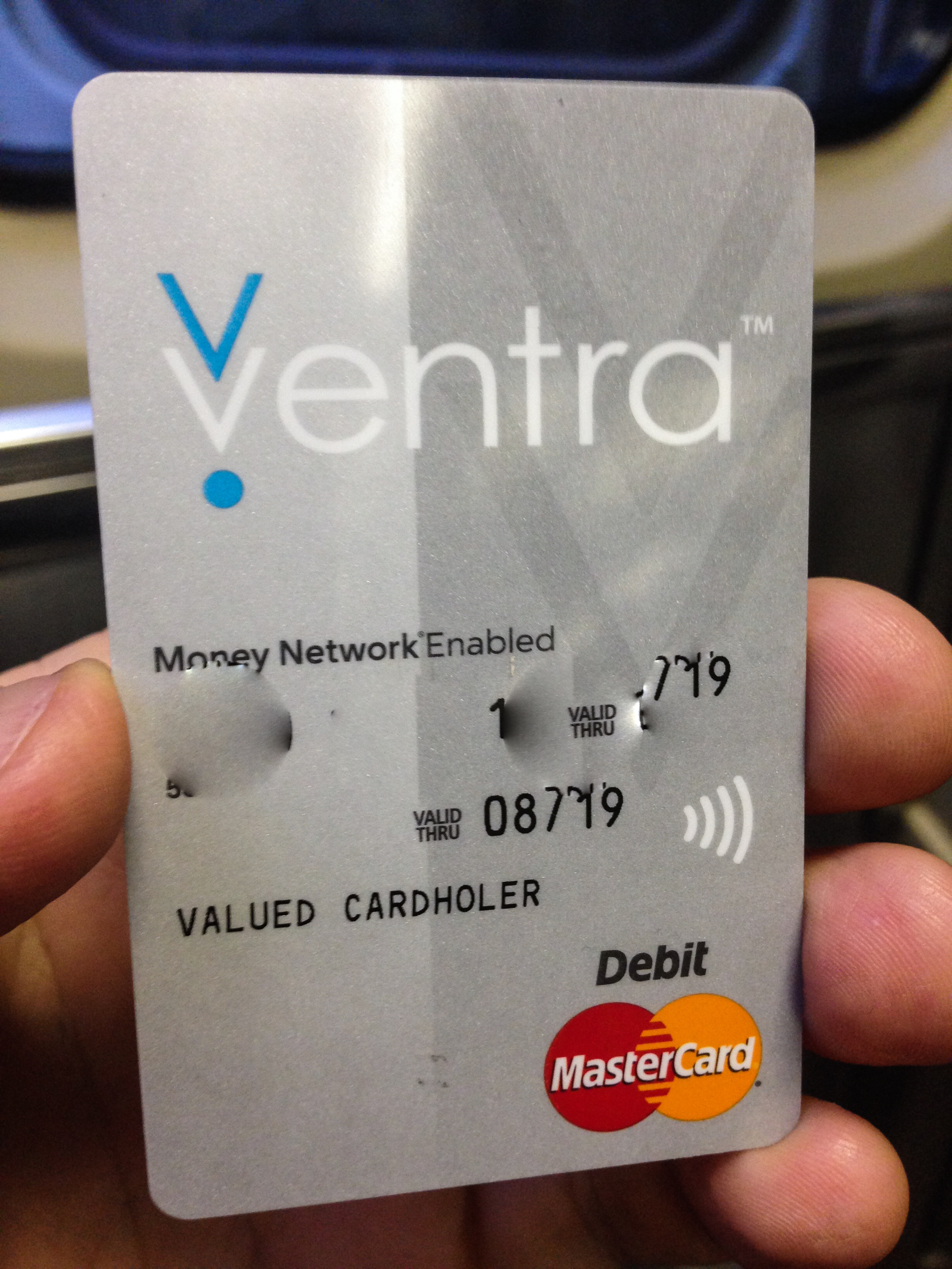 Ventra card -- Numbers obscured